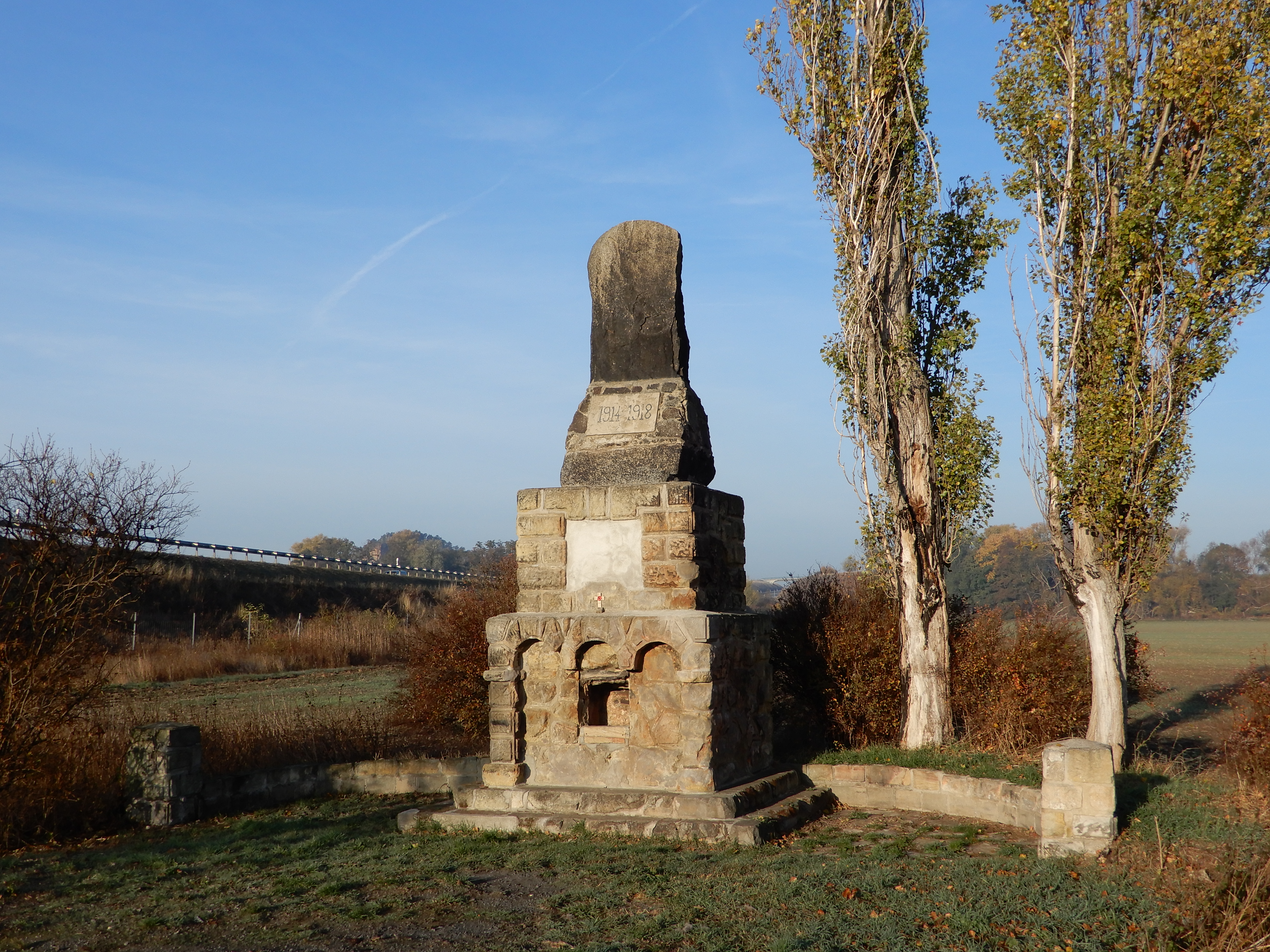 Denkmal zur Erinnerung an das Kriegsgefangenenlager Quedlinburg 1914-1922